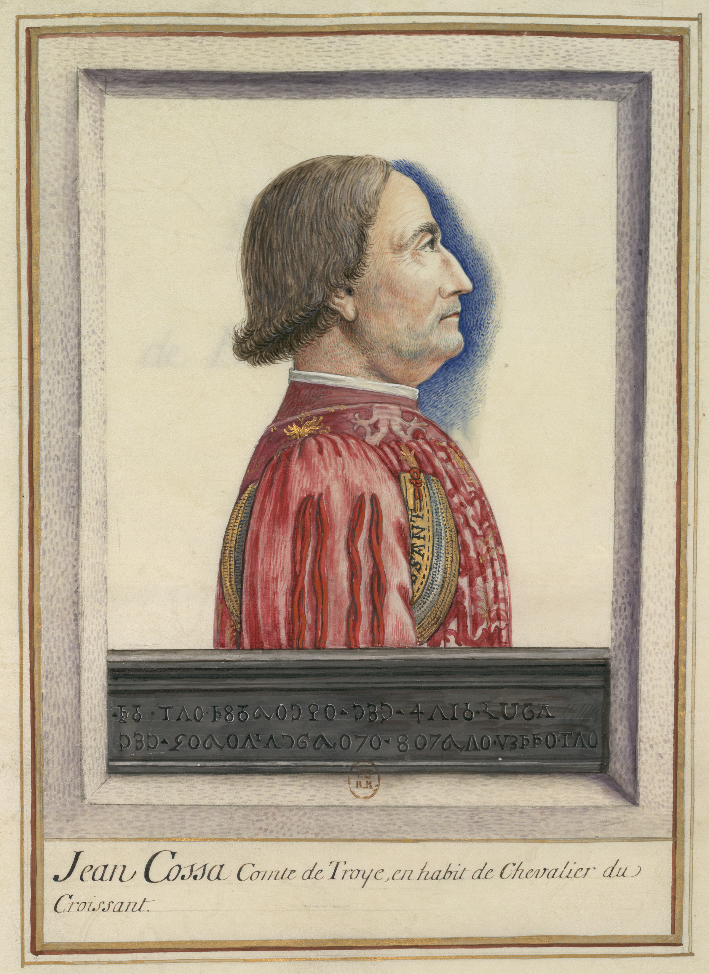 Miniature représentant Jean Cossa, chevalier du Croissant en costume de l'ordre. La tête est de profil.